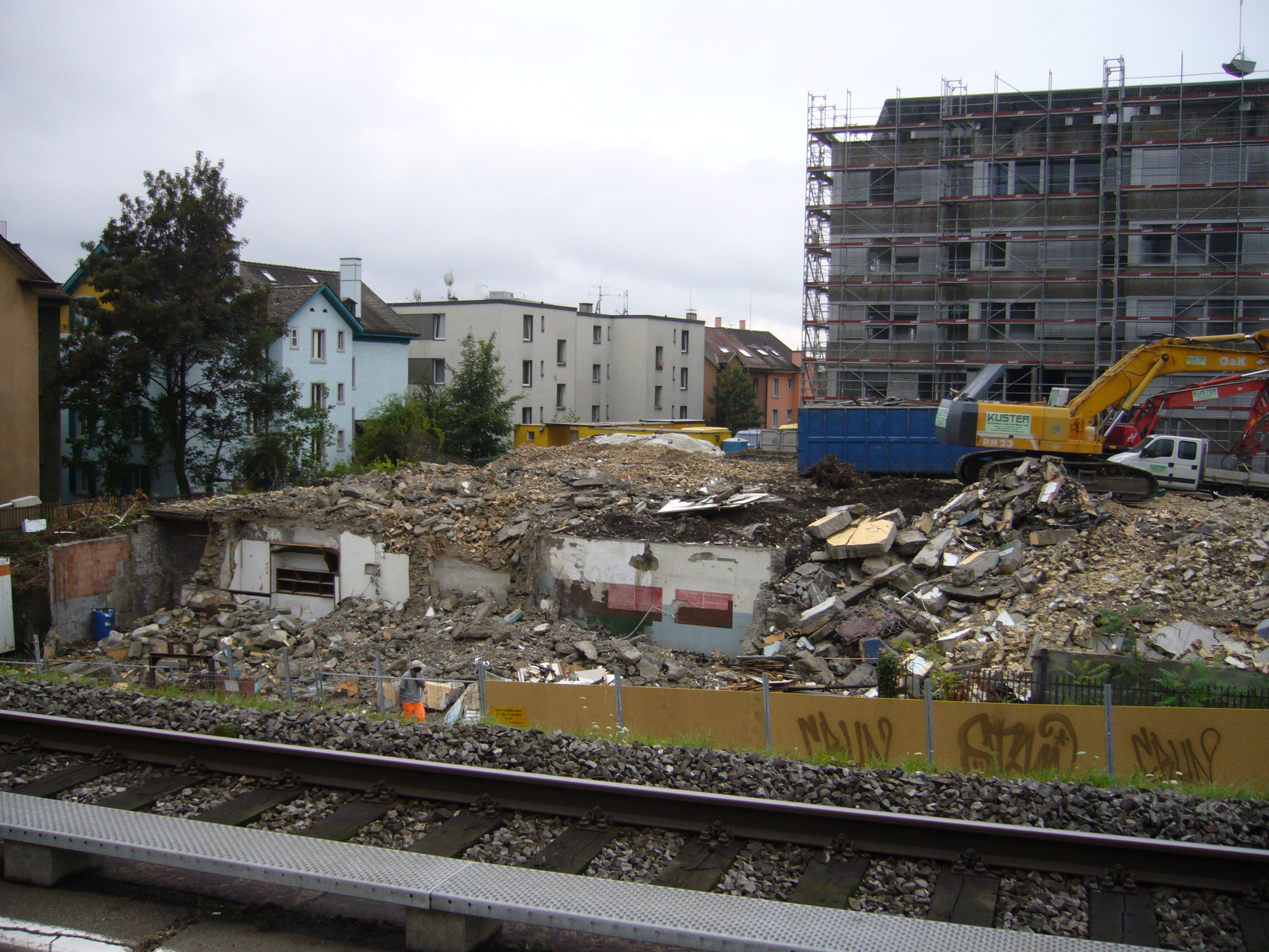 Blick von der Haltestell Zürich-Wipkingen auf Bauschutt nach dem Abbruche von Häusern an der Dammstraß; im Hindergrunde links Häuser an der Burgstraß, rechts Baustell an der Habsburgerstraß.